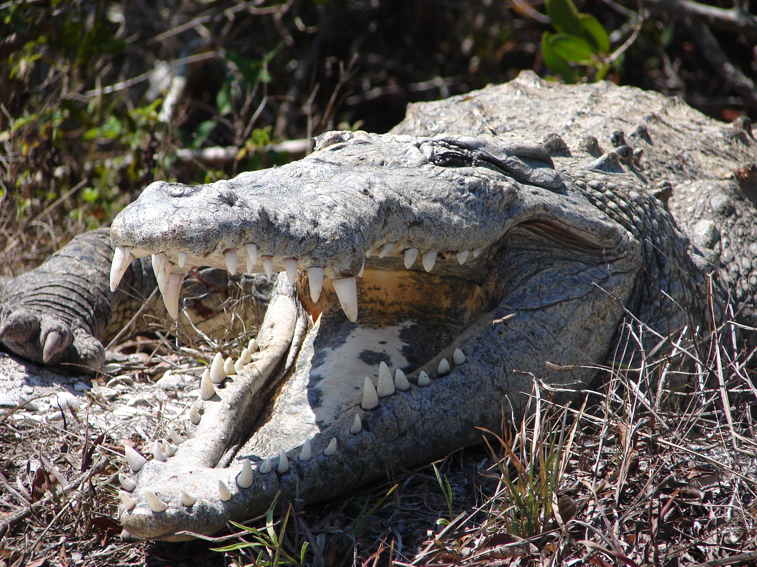 Crocodylus acutus